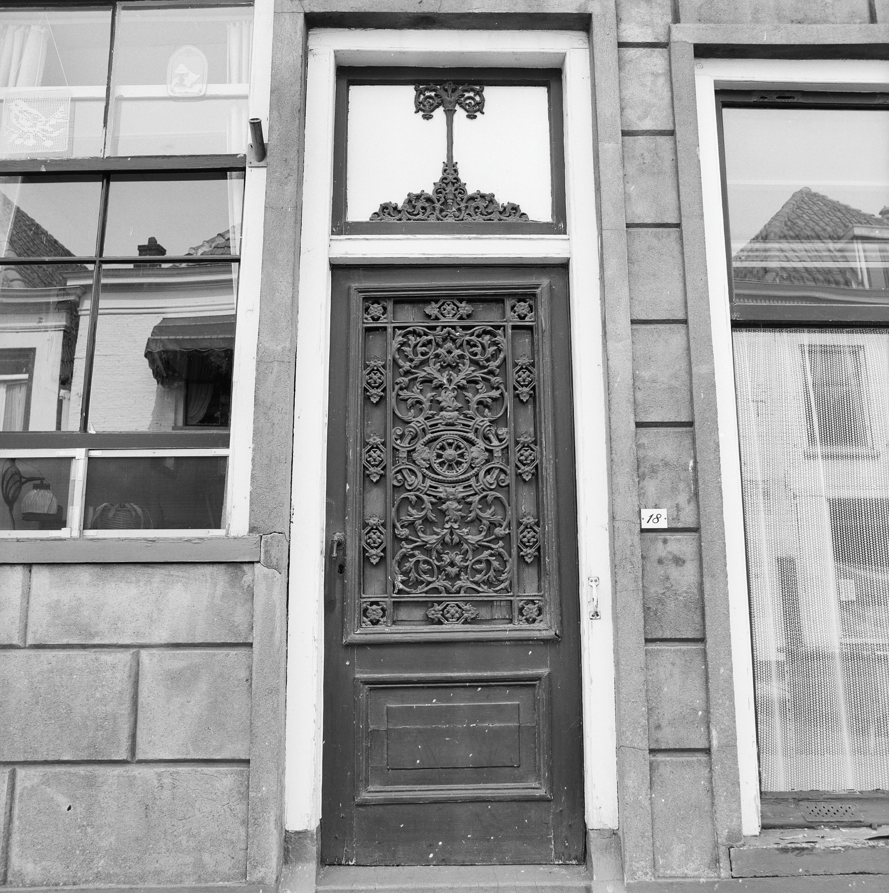 Exterieur INGANGSPARTIJ, DEURROOSTER EN BOVENLICHT